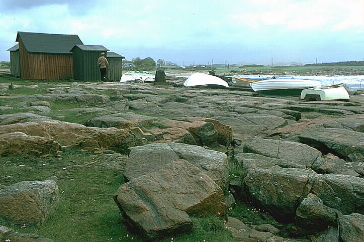 Uppdragna båtar vid kusten. Bilden troligen från mitten av 1970-talet. Motiv: Laxvik Kategori: Kust- och skärgårdsmiljöUppdragna båtar vid kusten. Bilden troligen från mitten av 1970-talet.